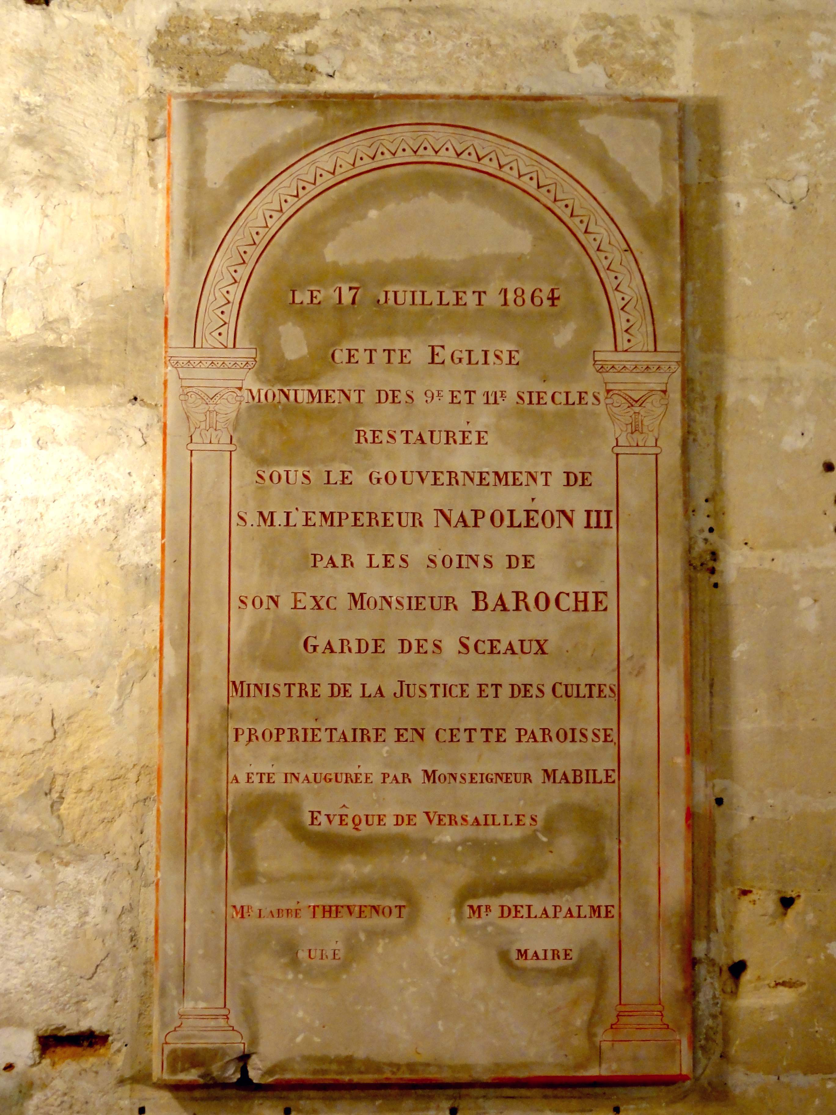 Mobilier de l'église - voir titre.